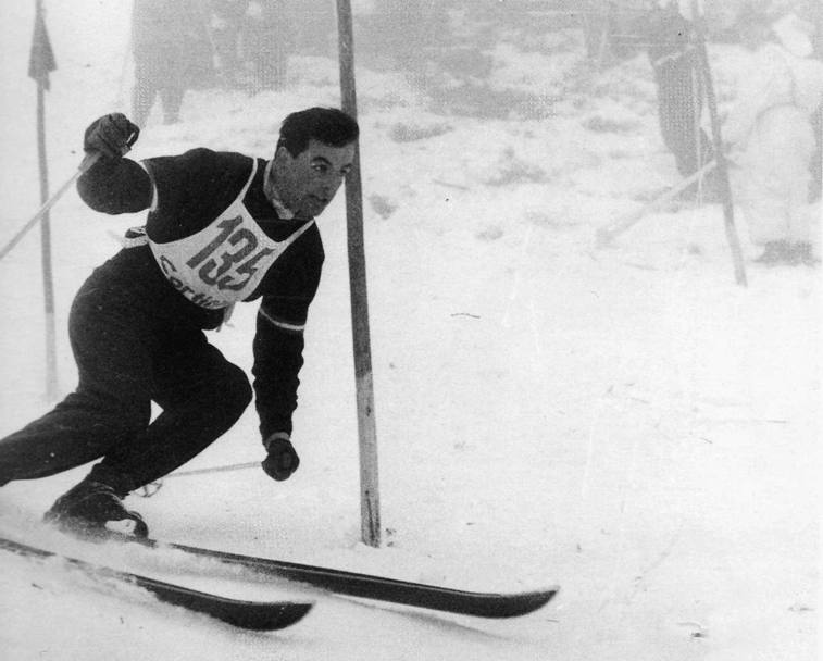 Toni Sailer nello slalom speciale di Cortina 1956